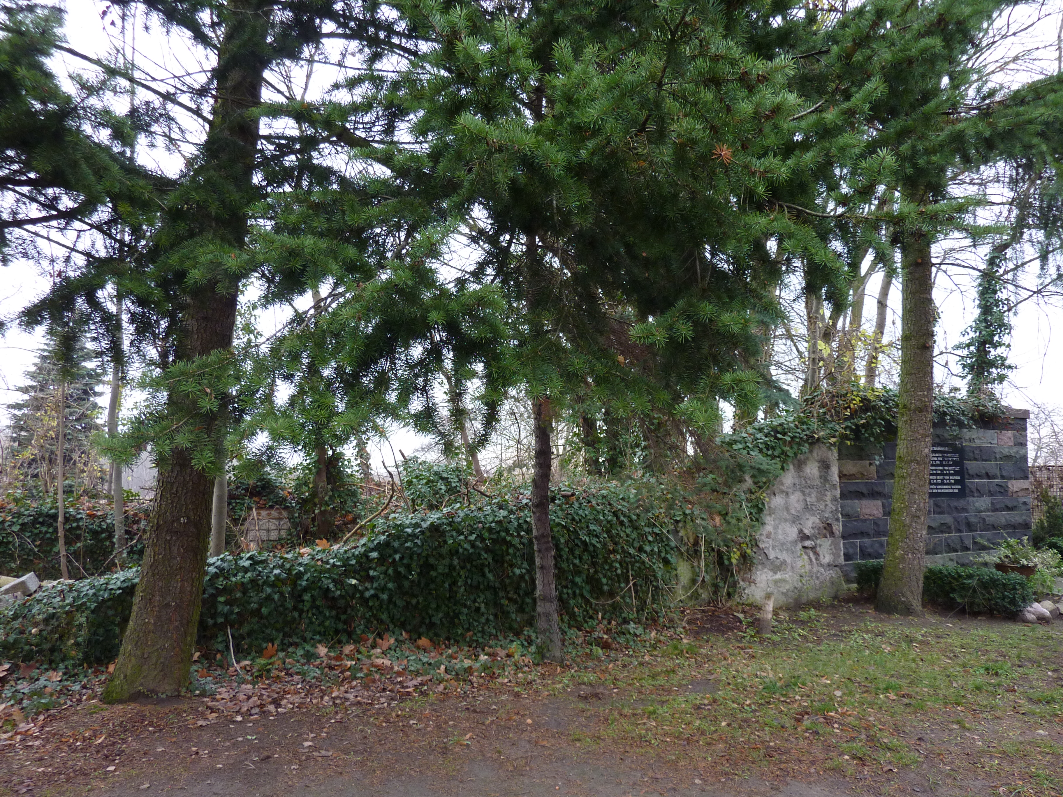 Ruine der Dorfkirche in Berlin-Falkenberg. Blickrichtung Norden.